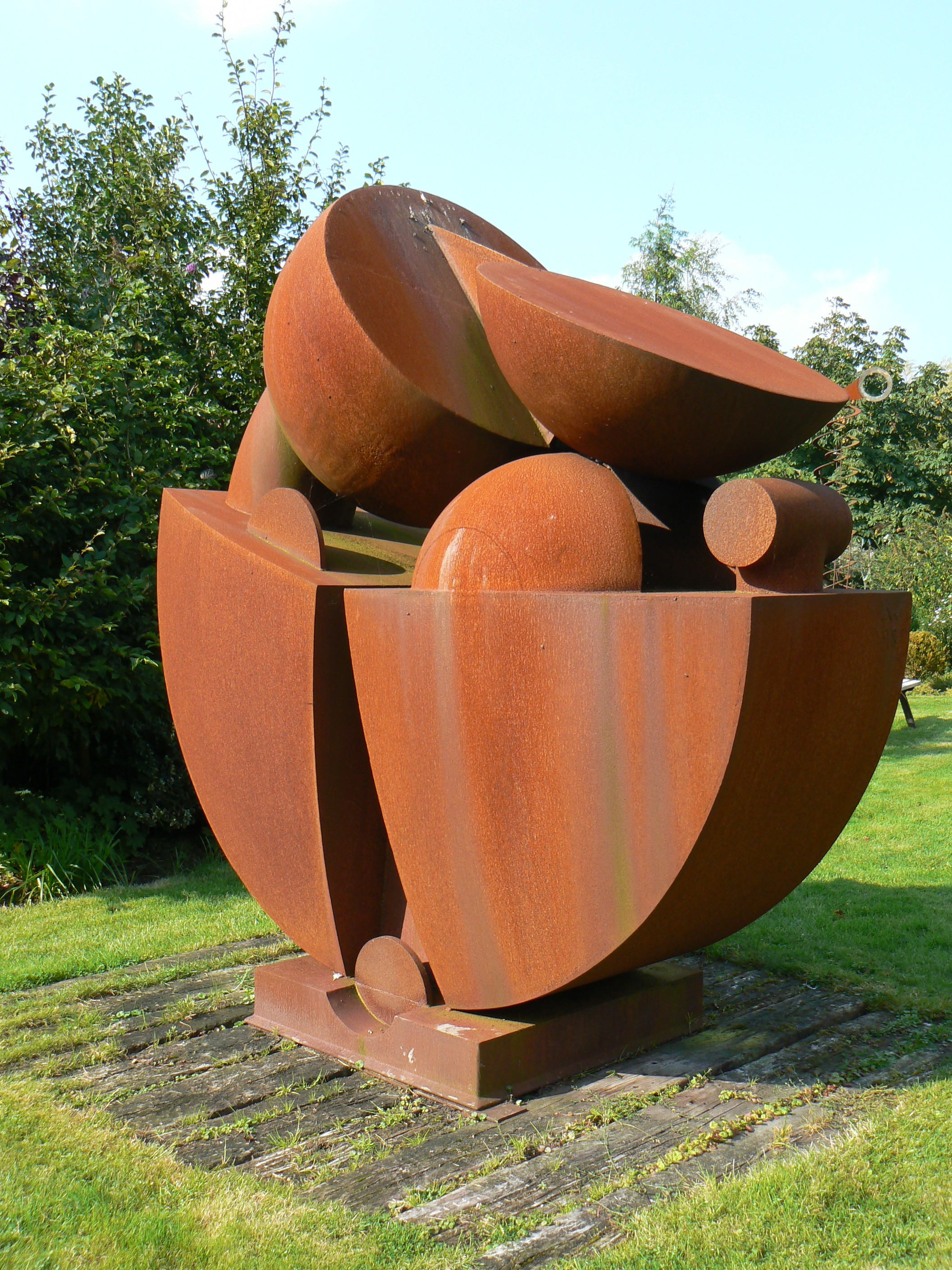 sculpture Kogger II (1998), Sammlung Wübbena in Funnix/Germany